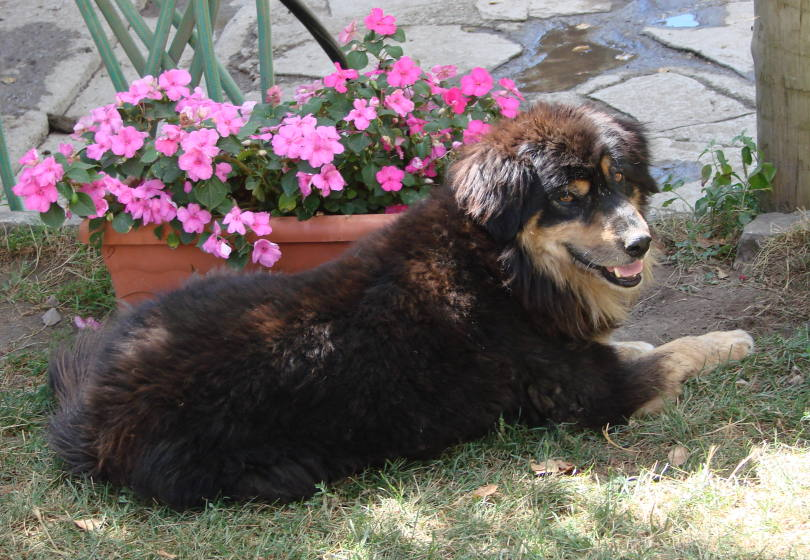 Perro de pastor del Pirineo Aragonés o "Can de Chira".